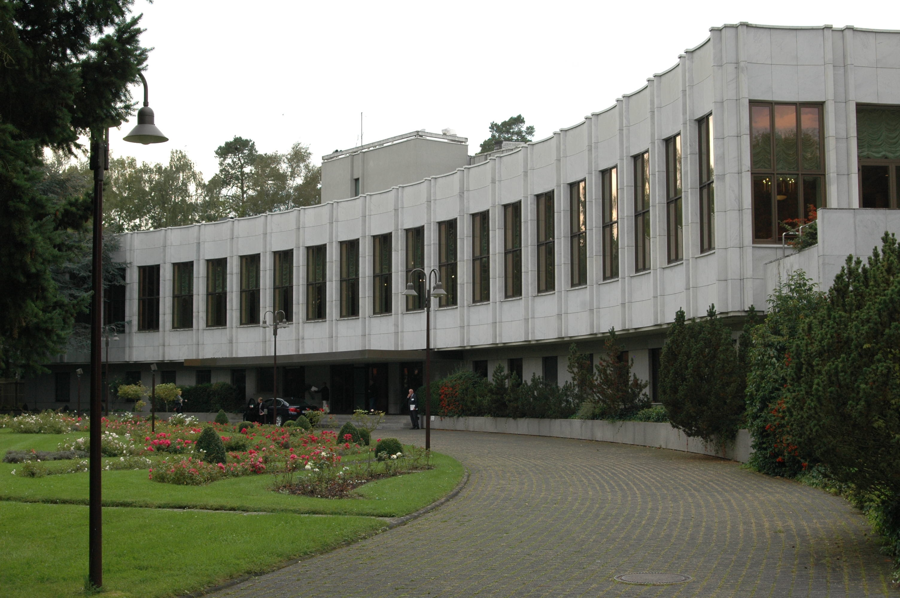 Generalkonsulat der Russischen Föderation auf der Viktorshöhe, Waldstraße 42, Bonn-Schweinheim: Paradeauffahrt